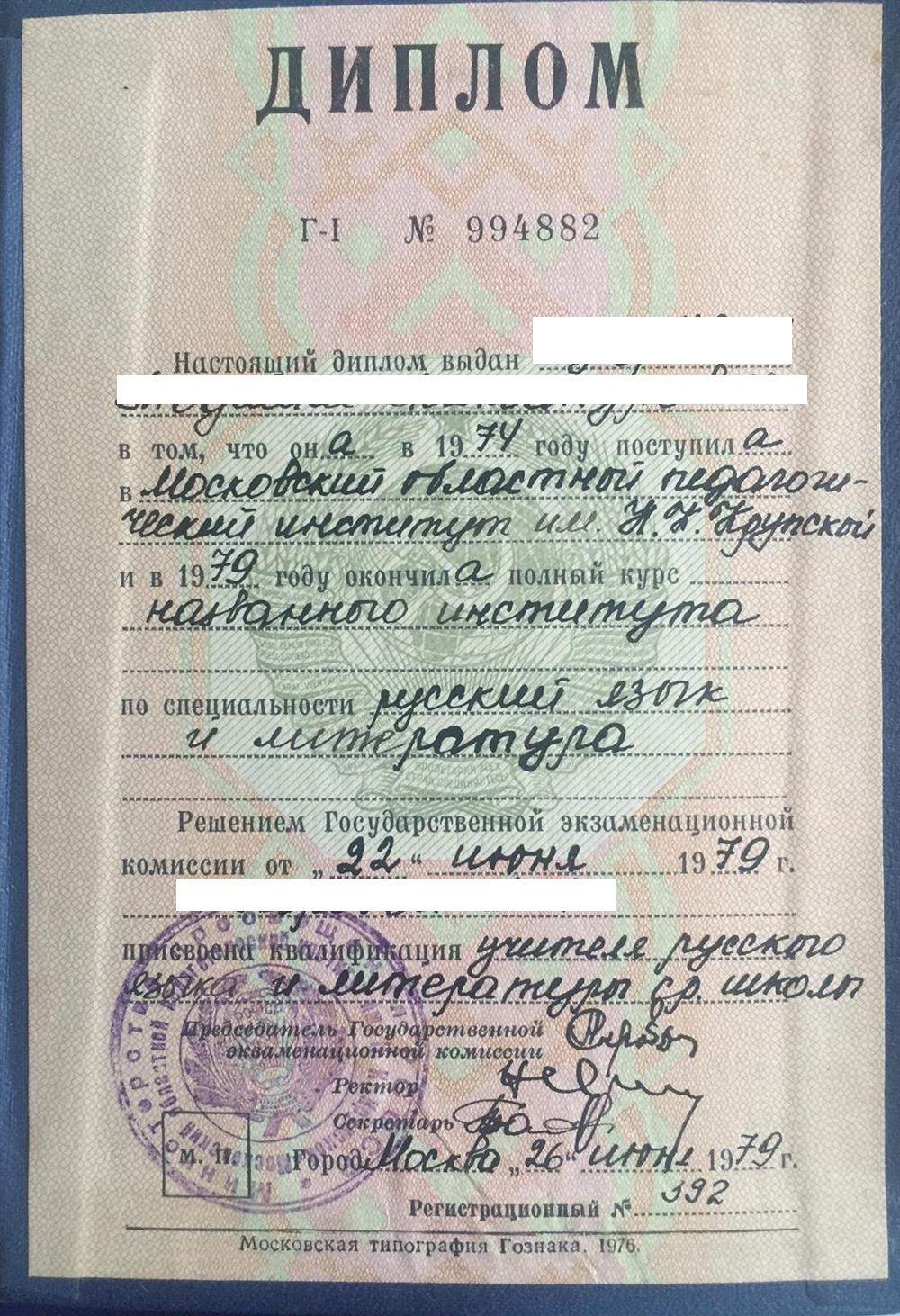 Диплом